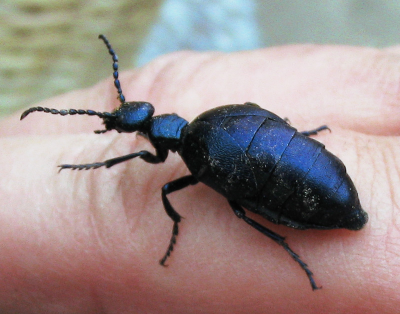 Beschreibung: Ölkäfer (Meloe violaceus) Fotograf: Darkone, 30. April 2005